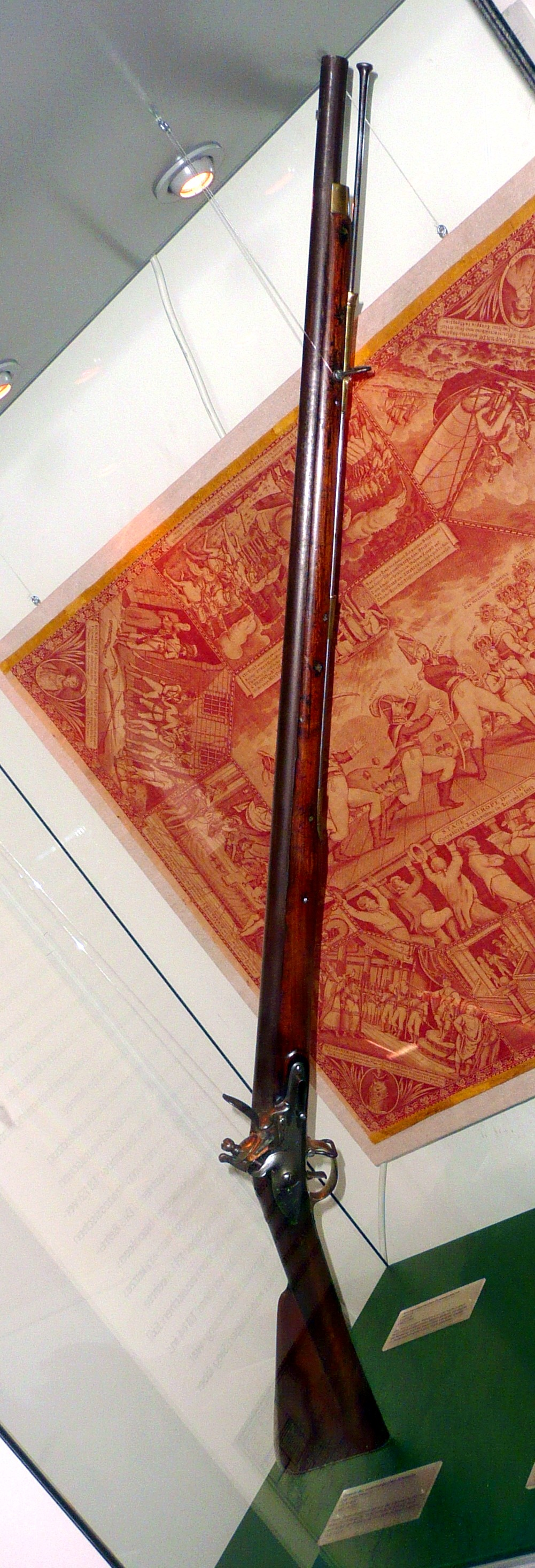 Gewehr "India Pattern" (Laut Angben der Museumsaustellung). Erstausstattung des Oldenburgischen Infanterieregimentes. Eines von 3000 Gewehren, die dem Herzogtum Oldenburg 1814 von den Briten überlassen wurden. Ausgestellt im Oldenburger Landesmuseum für Kunst- und Kulturgeschichte. (Es ist zweifelhaft, ob es sich dabei nicht tatsächlich um eine Standard Brown-Bess handelt, da das Gewehr im Bergleich zu lang erscheint)